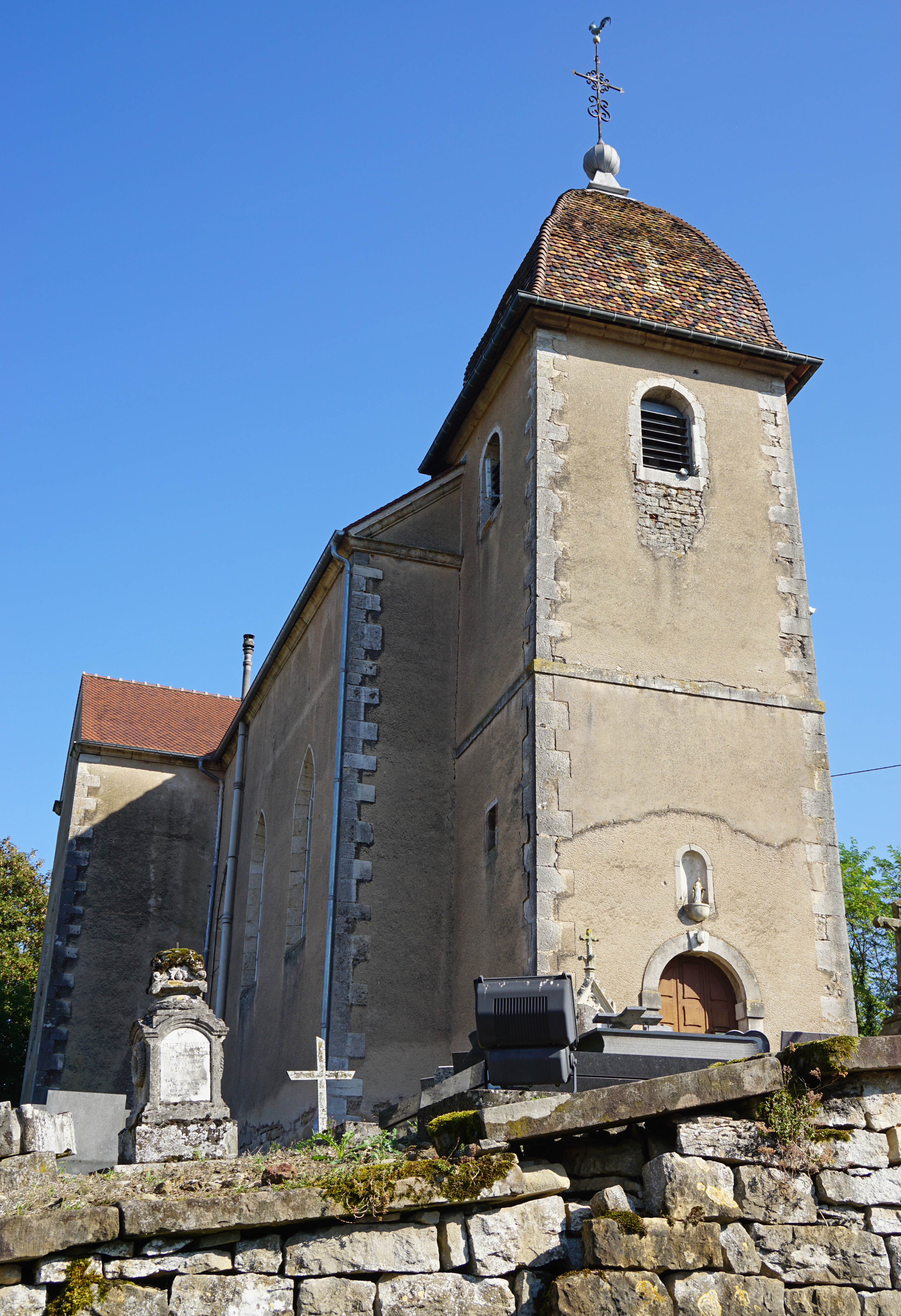 L'église de Grammont (Haute-Saône).